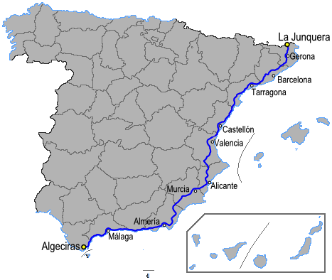 Mapa de la autovia A7